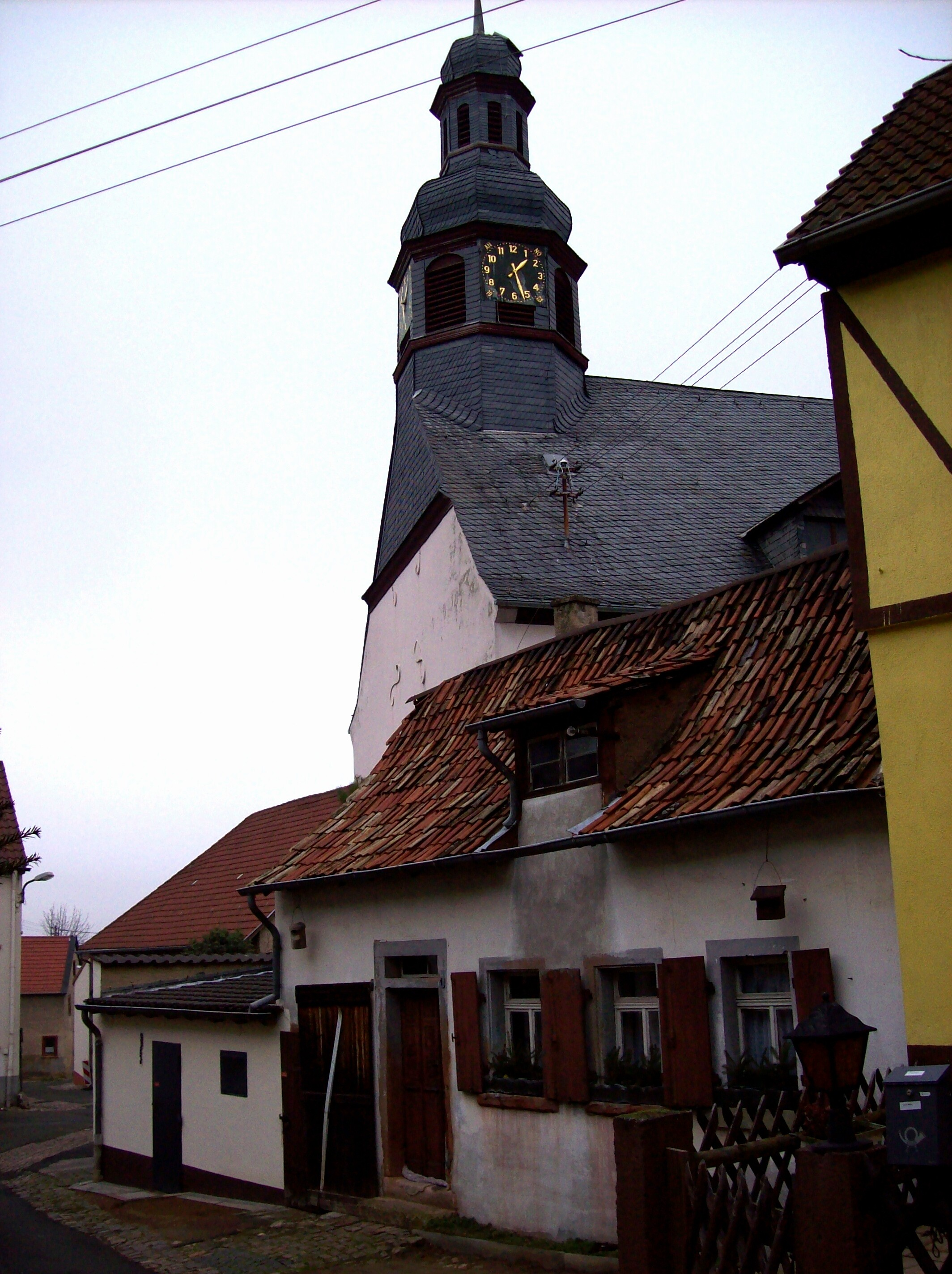 Ev. Martinskirche Bosenheim / Rheinland Pfalz 1744/45 mit historischem Haus im Vordergrund (leider bekommt man die Kirche wg. der Enge der Gassen kaum recht ins Bild)